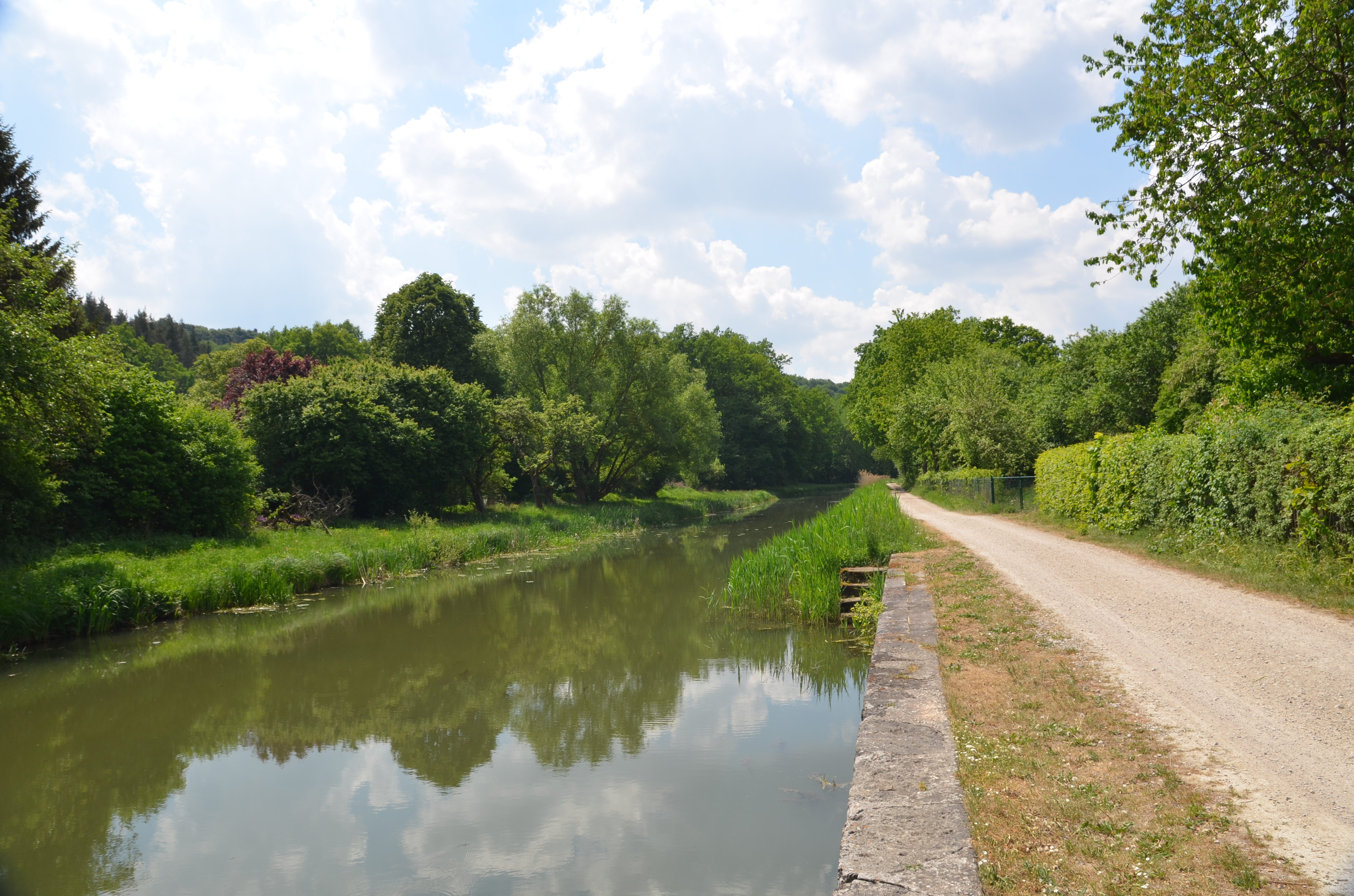 Alter Kanal bei Rasch